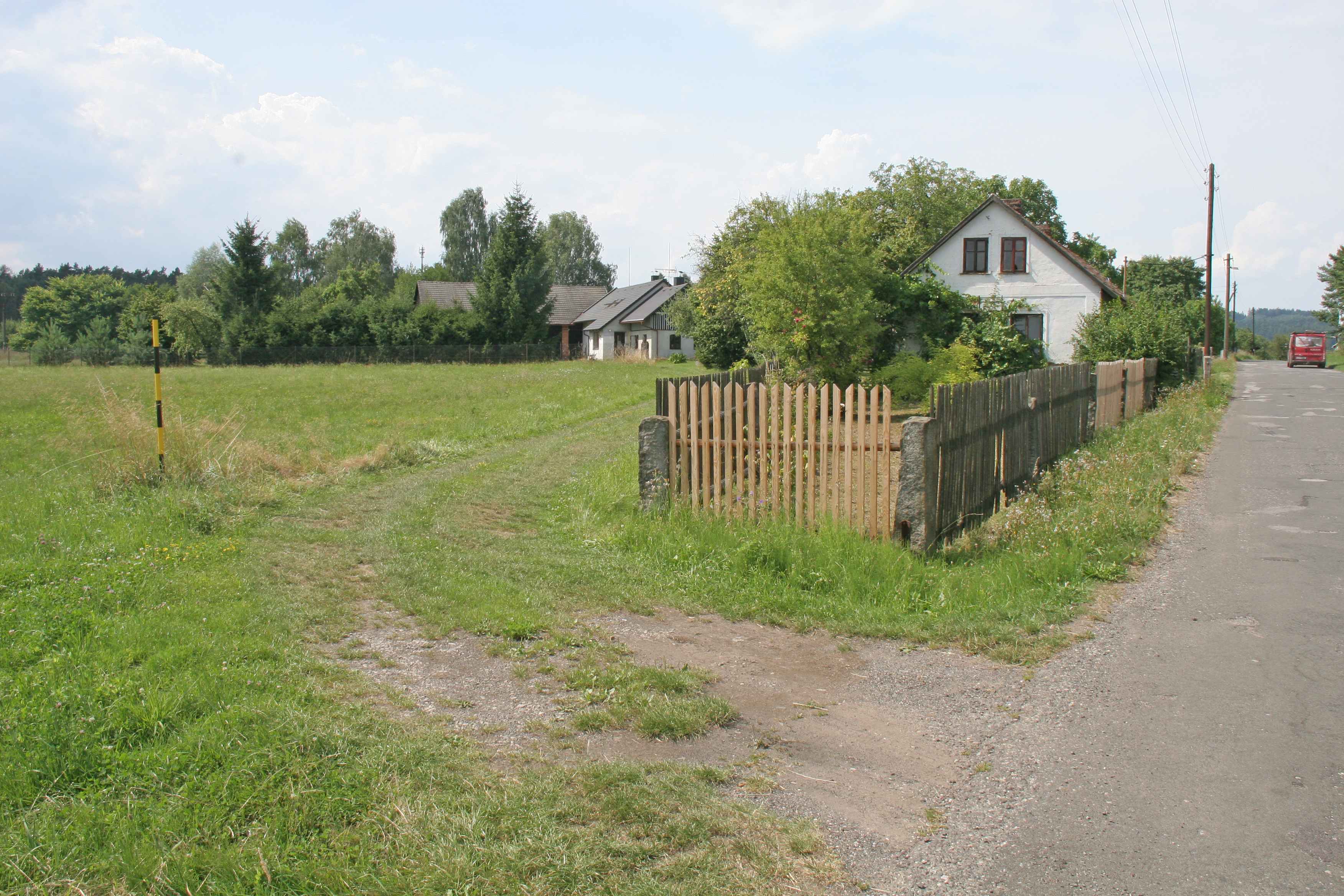 Dolní Dehtov čp. 14